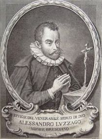 Effigie del ven. Alessandro Luzzago